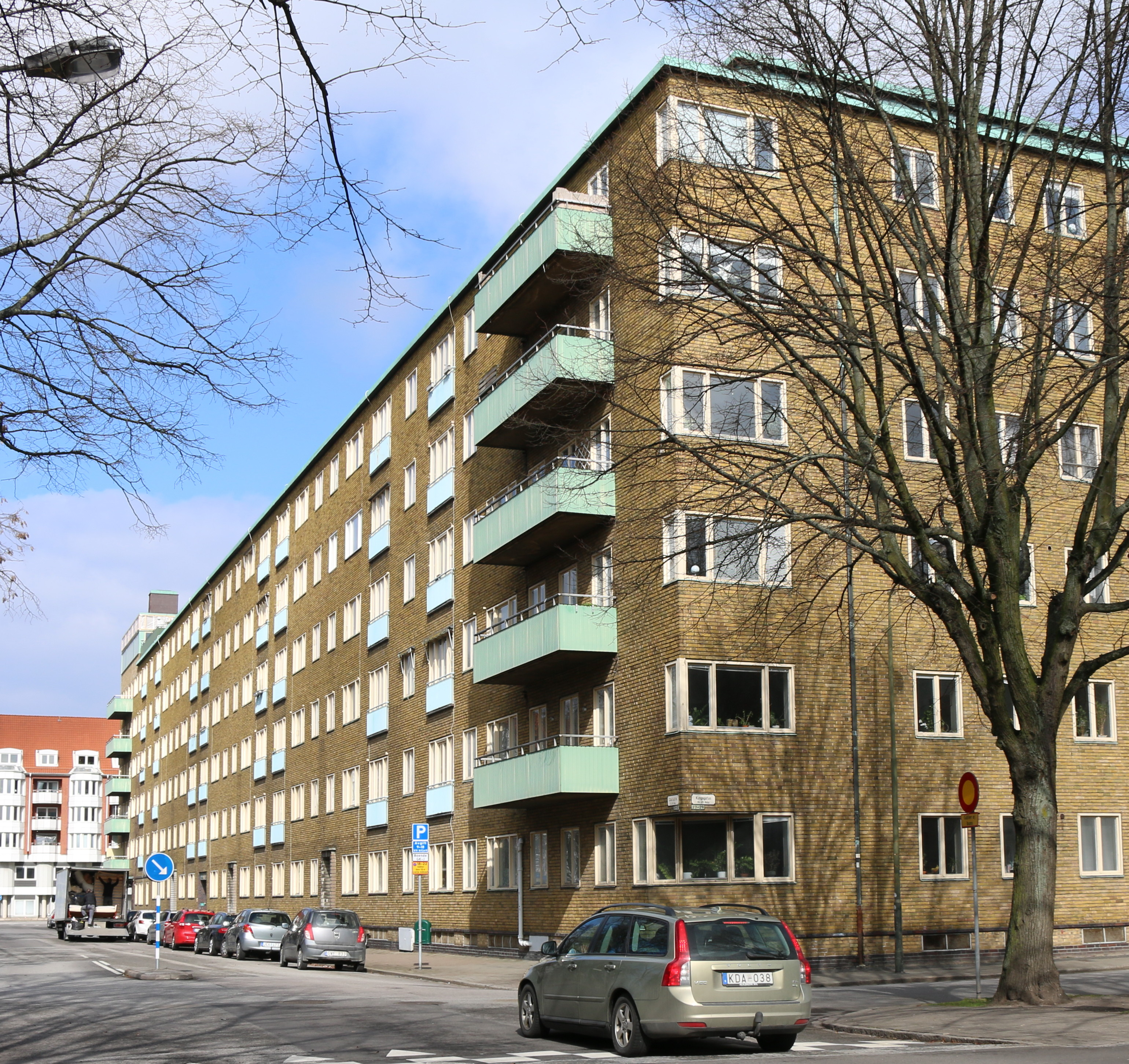 Malmgården, Malmö, mars 2015